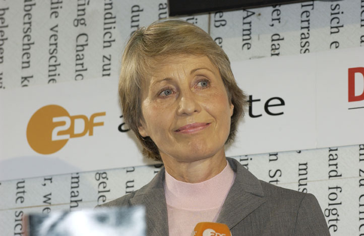 Brigitte Seebacher-Brandt auf dem Blauen Sofa während der Frankfurter Buchmesse 2004.